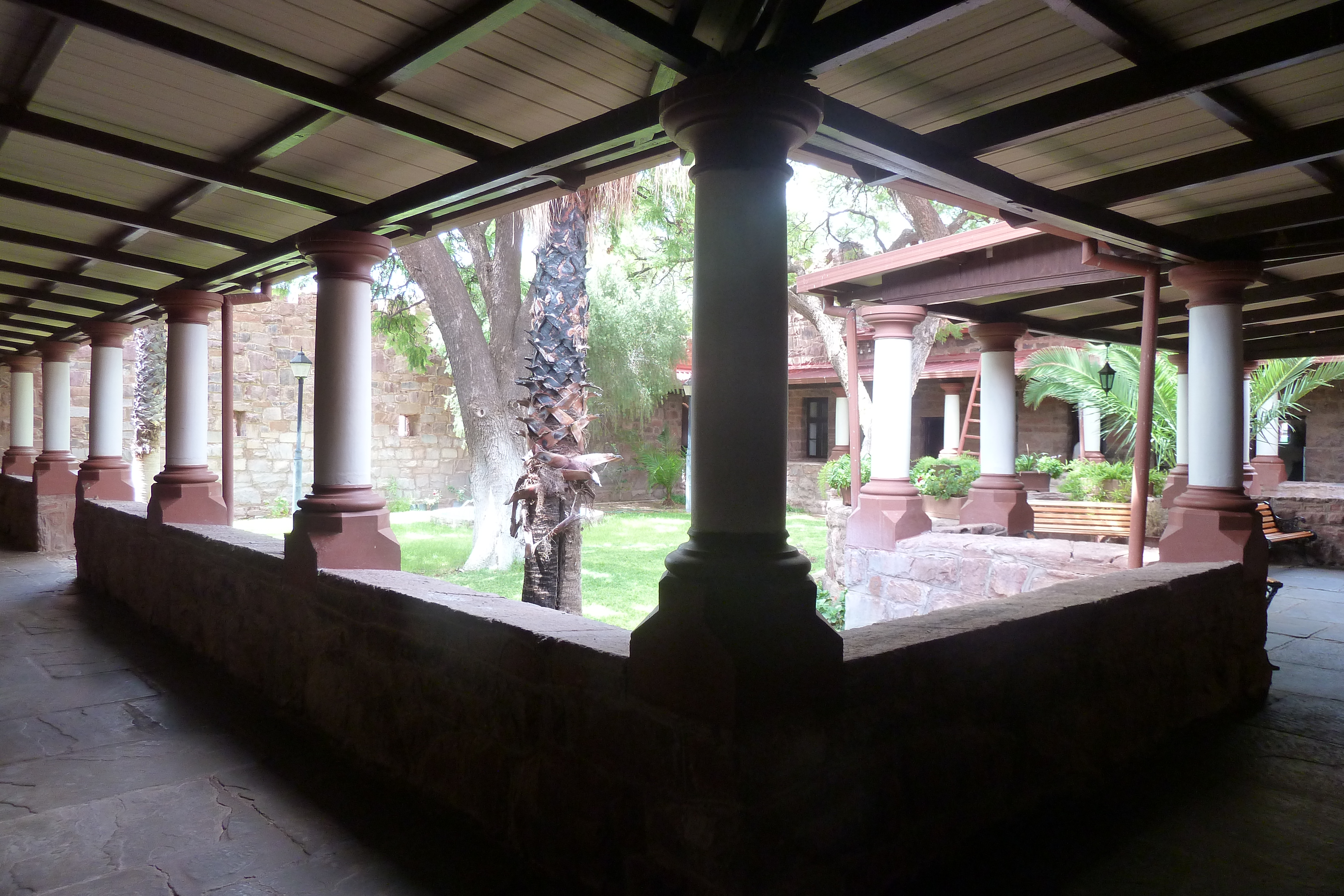 Schloss Duwisib Innenhof als Art Kreuzgang